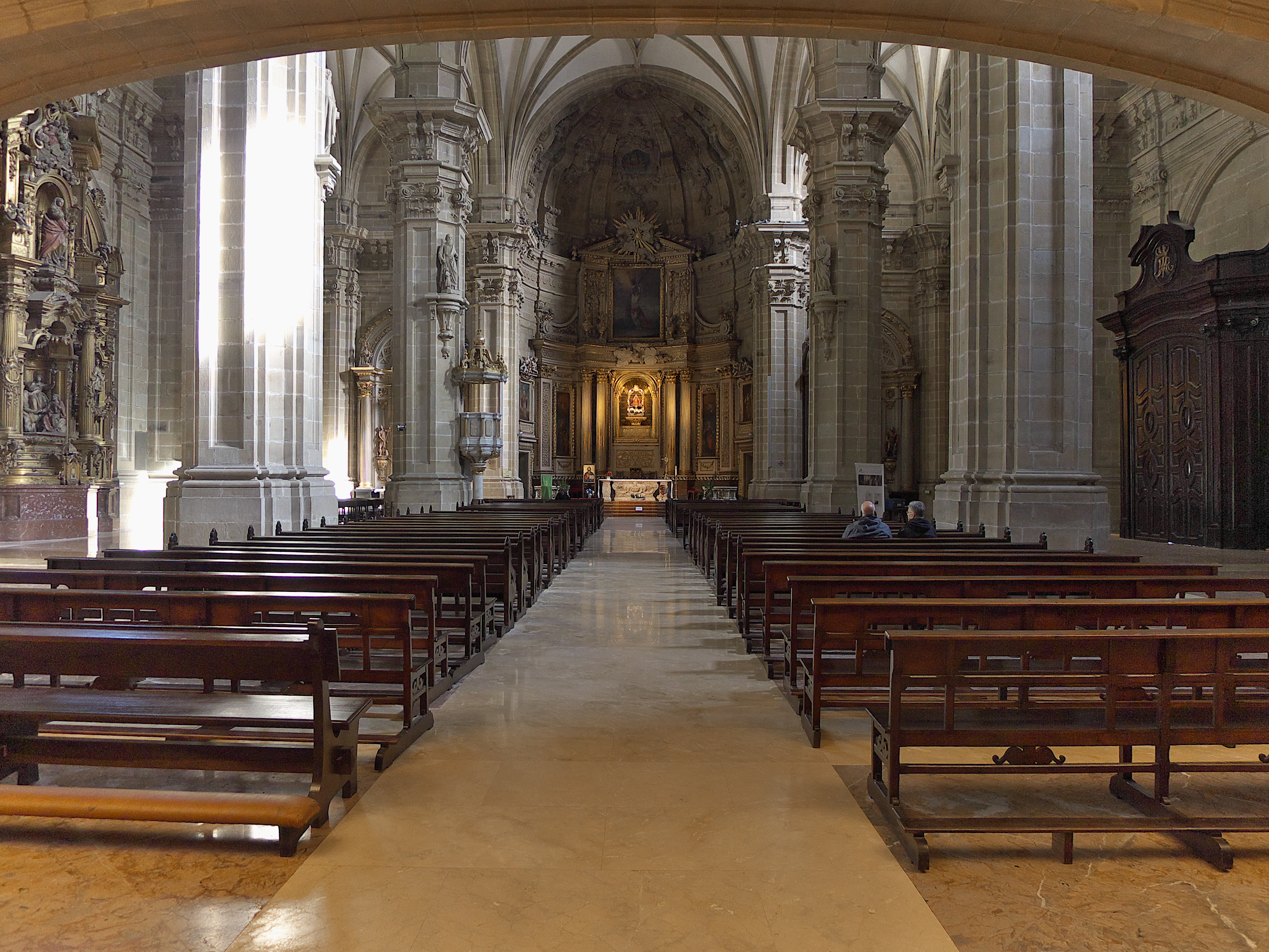 Pedro Ignacio de Lizardi y Miguel de Salezán, realizan las trazas de la iglesia (1743)